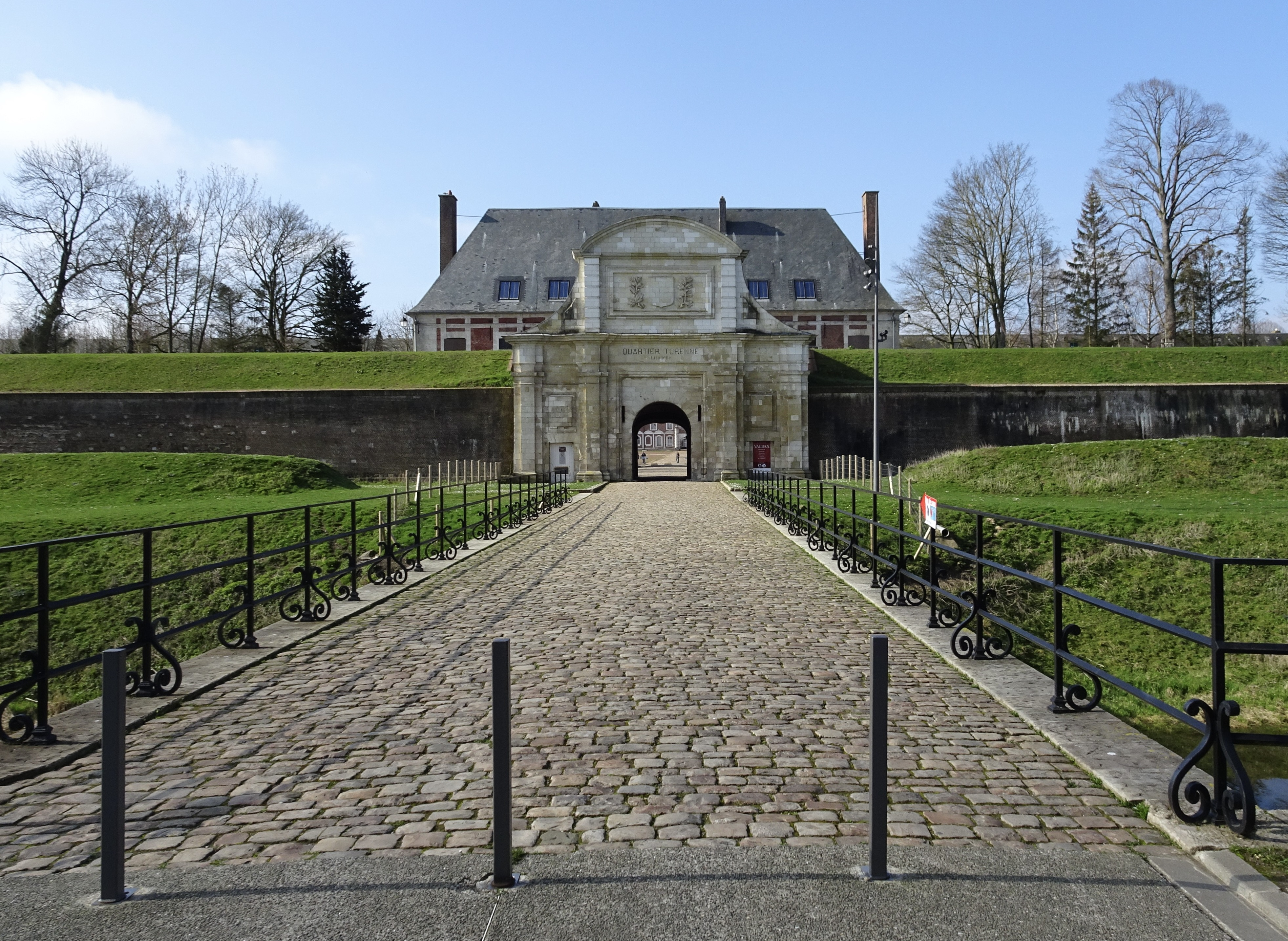 Citadelle - Ville d'Arras This building is en partie classé, en partie inscrit au titre des Monuments Historiques. .